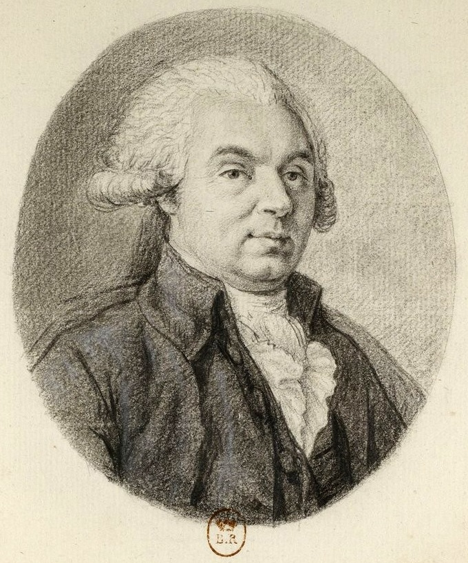 Mr Petion de Villeneuve : avocat, deputé du bailliage de Chartres, dessin au crayon noir.